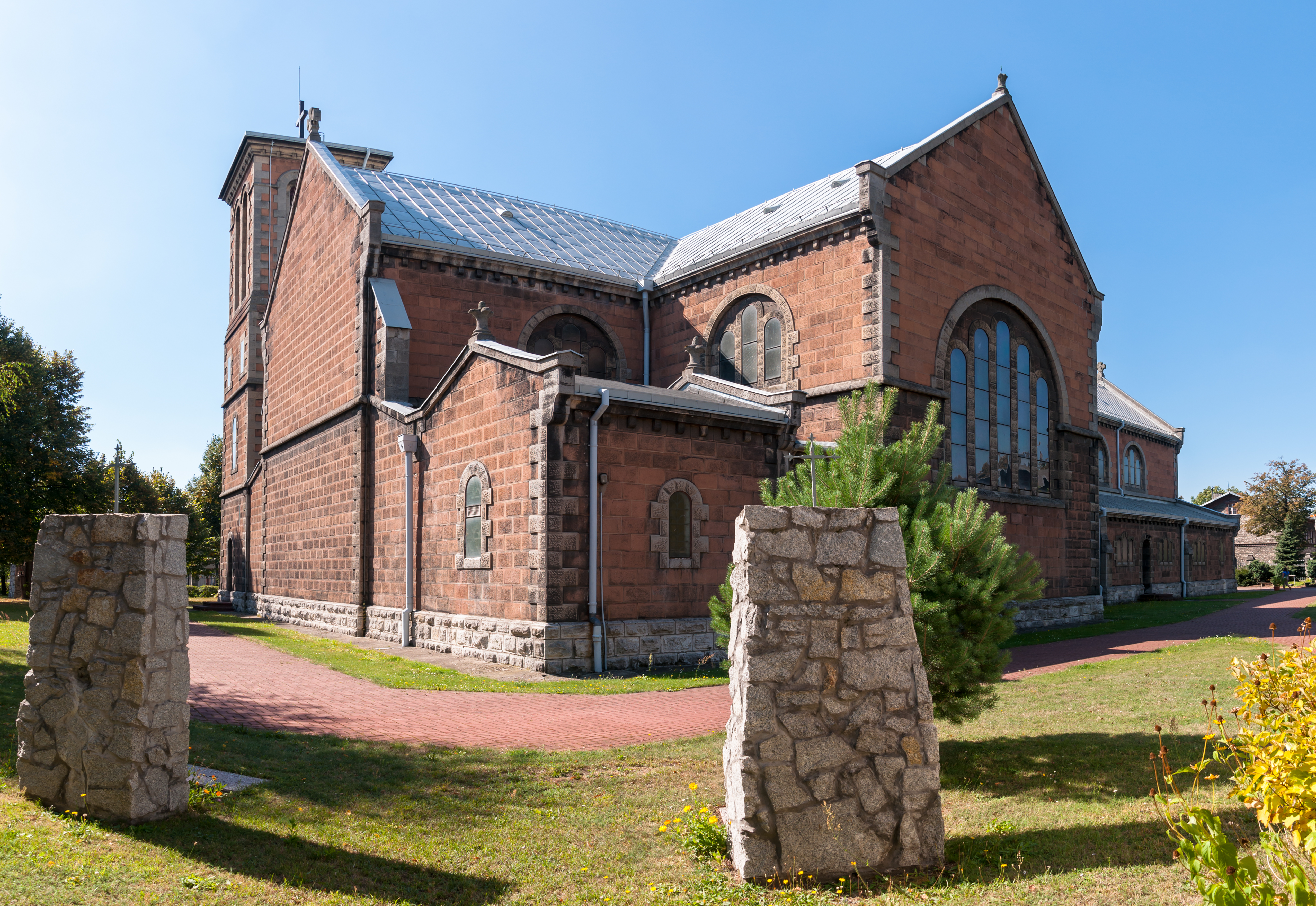 Czeladź, ul. Kościuszki / Francuska. Kościół par. pw. Matki Boskiej Bolesnej, 1922-1924.